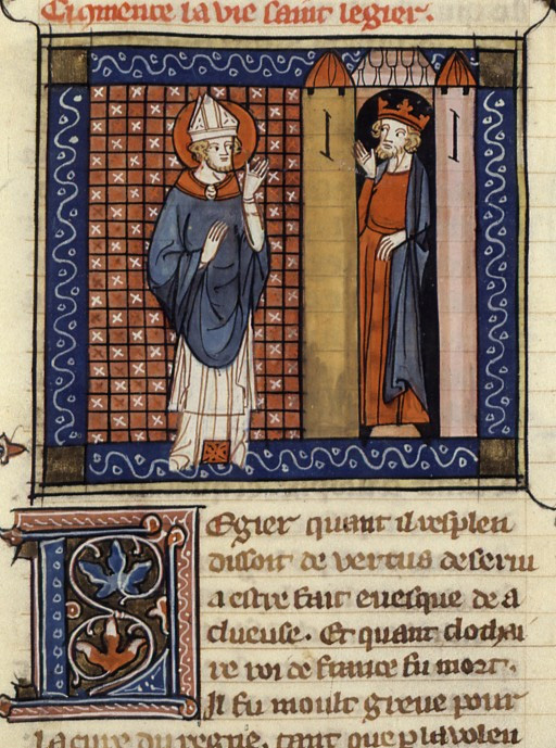 Saint Léger et Childéric II. Cote : Français 241 , Fol. 267v. Jacobus de Voragine, Legenda aurea (traduction de Jean de Vignay), France, Paris, XIVe siècle, Richard de Montbaston.